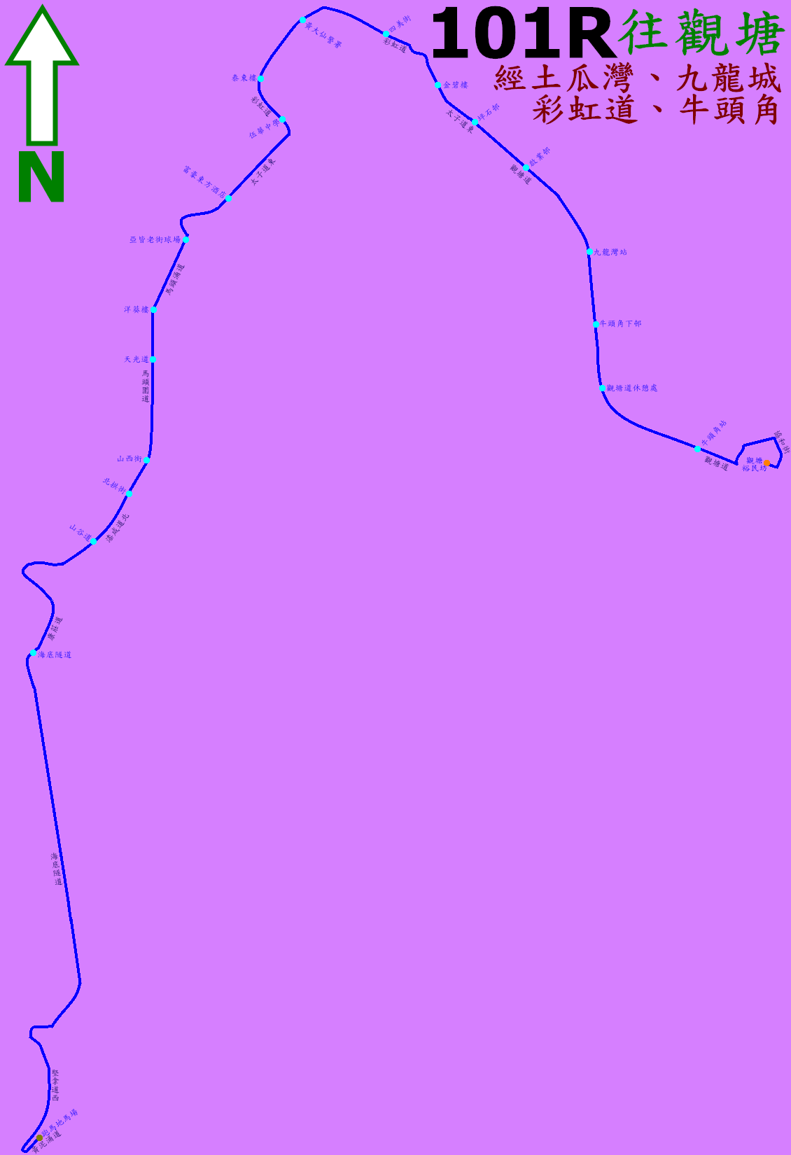 中文（香港）: 過海隧巴101R線的走線圖